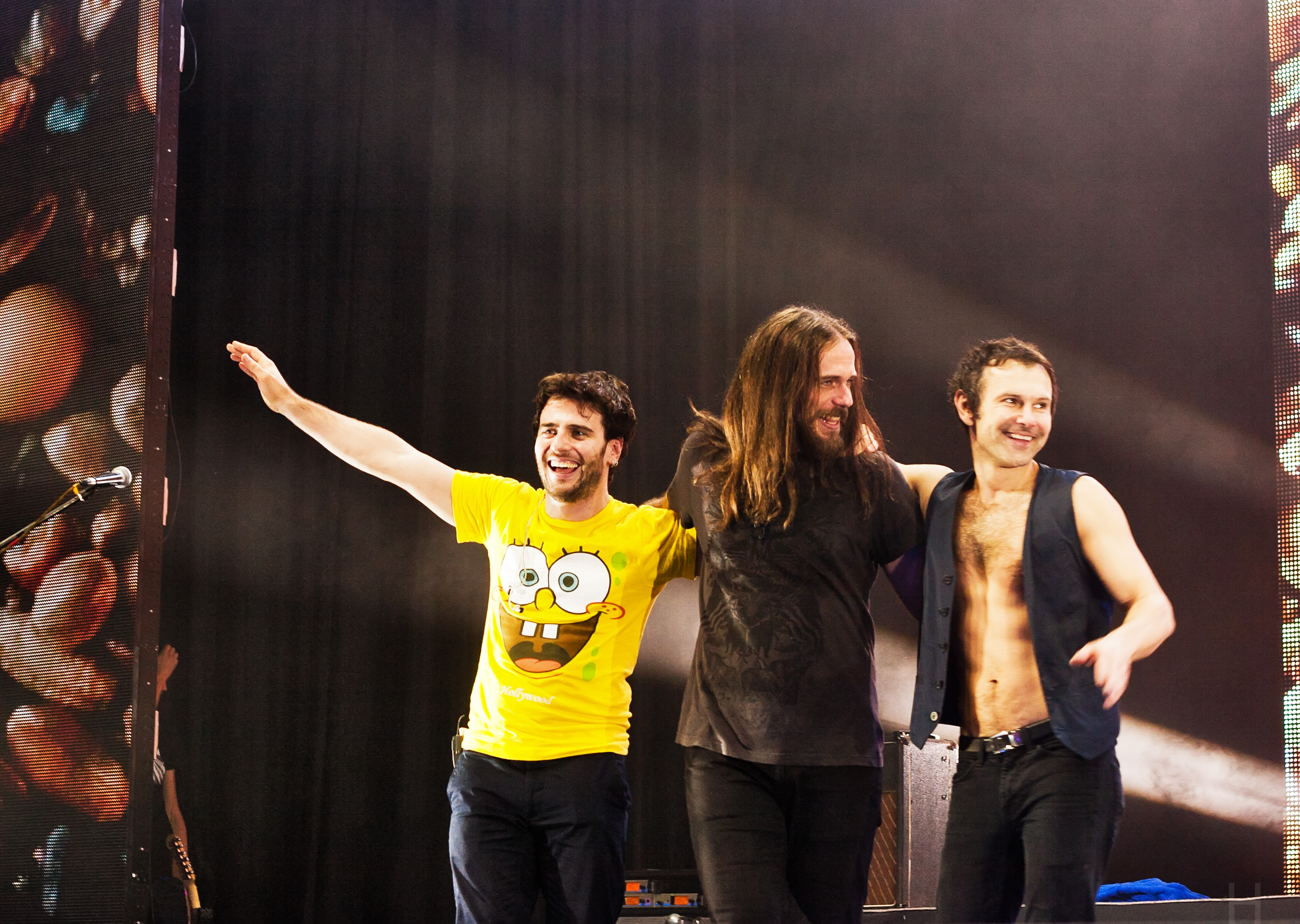 Тур Земля. Концерт ОЕ в Киеве. Милош Елич, Владимир Опсеница, Святослав Вакарчук.